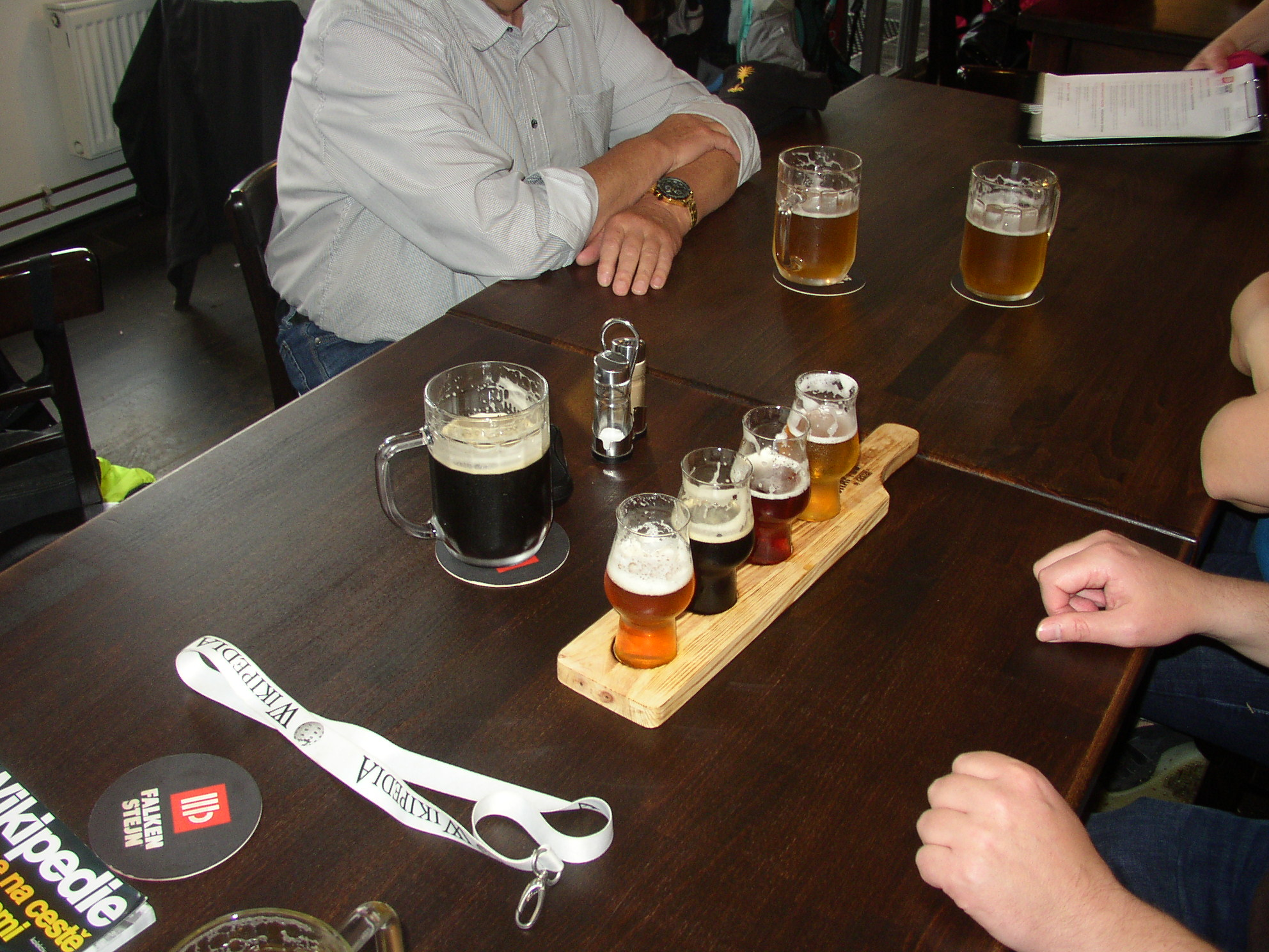 Vzorky piv na setkání wikipedistů v Krásné Lípě